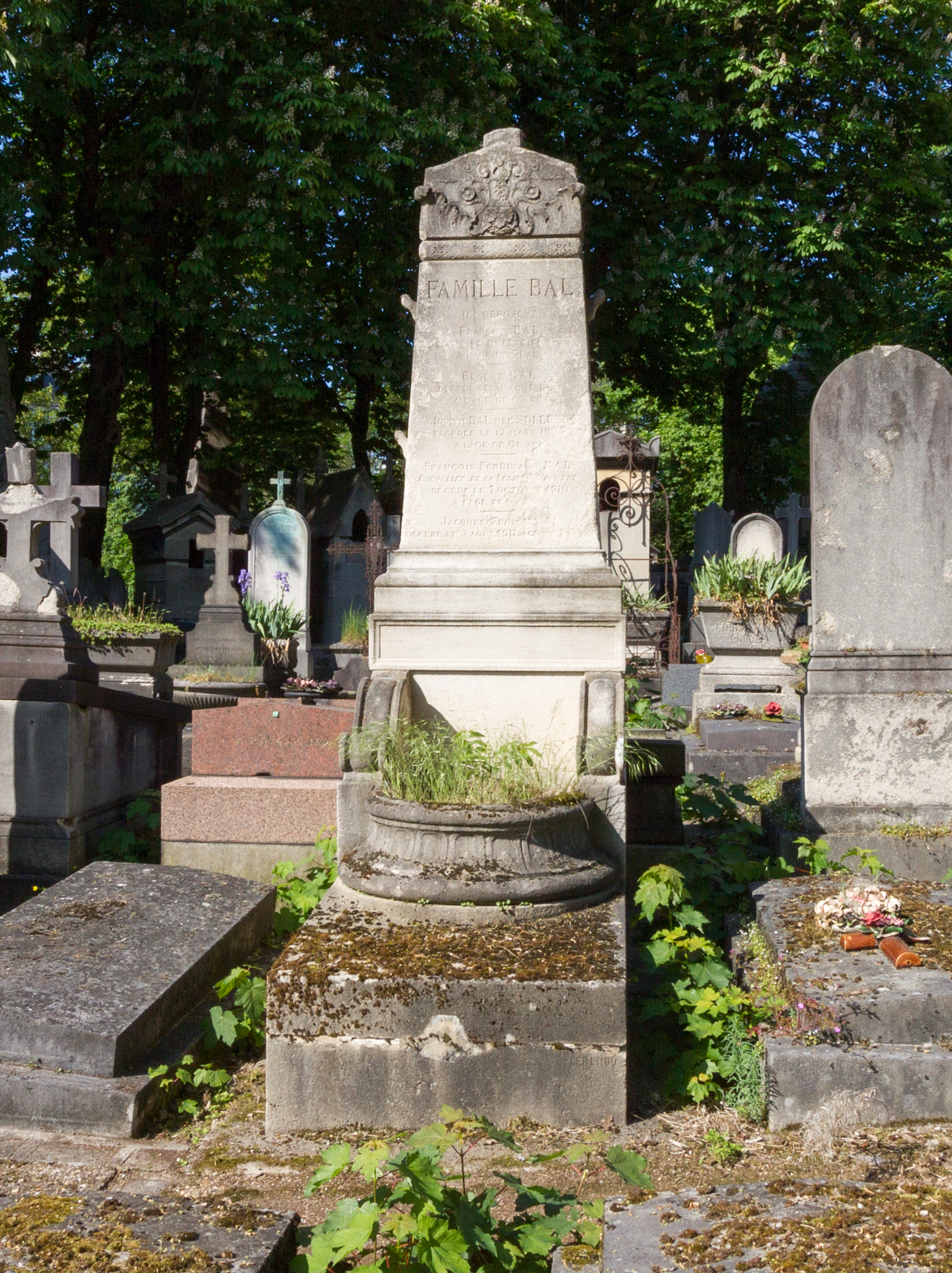 Sépulture de Ferdinand Bal (1843-1910), architecte et ingénieur, décoré personnellement de la médaille de chevalier de la légion d'honneur par Napoléon III.